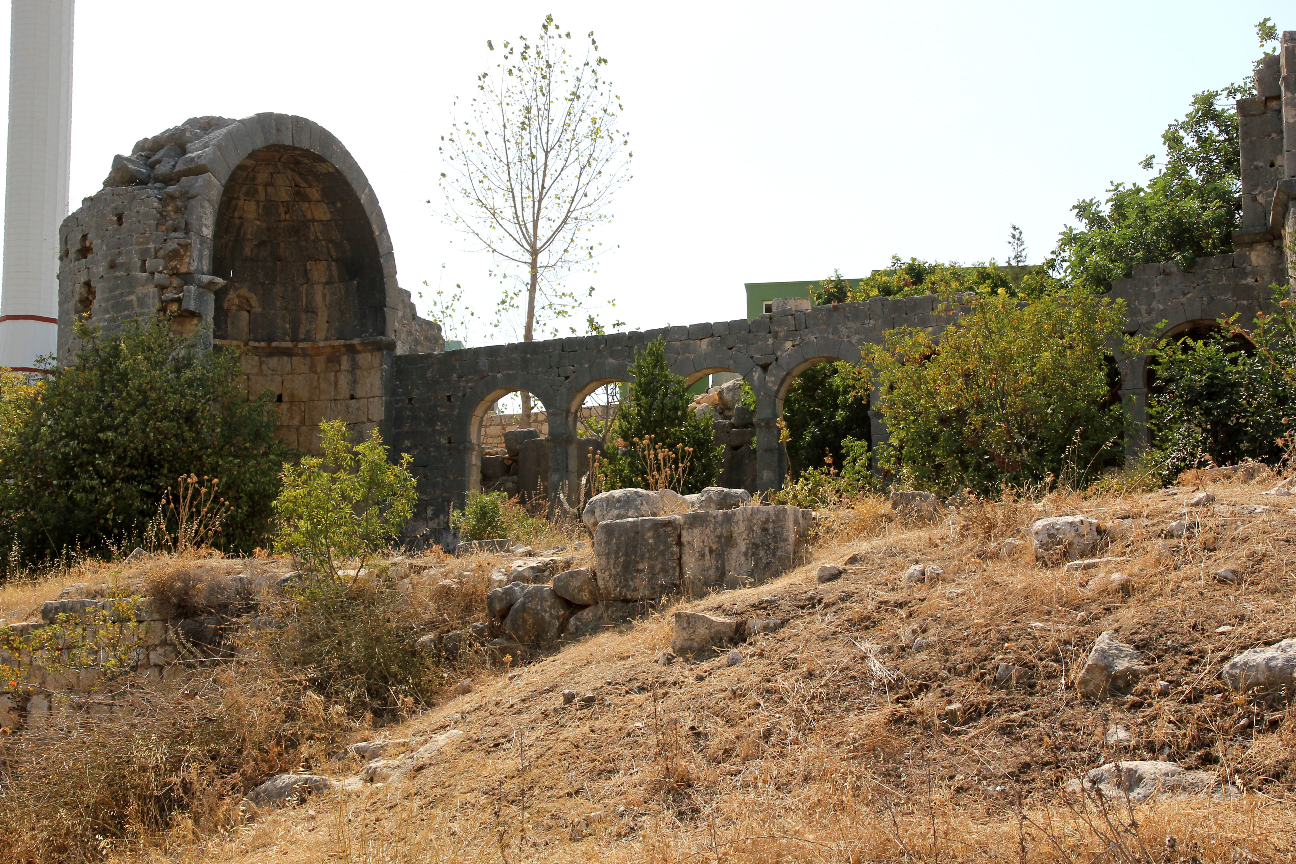 Kirche von Hasanaliler bei Silifke, Südtürkei, Gesamtansicht von Nordwesten